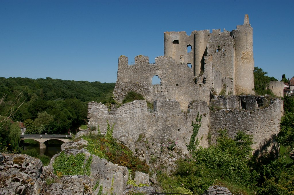 Ruines du château d'Angles-sur-l'Anglin